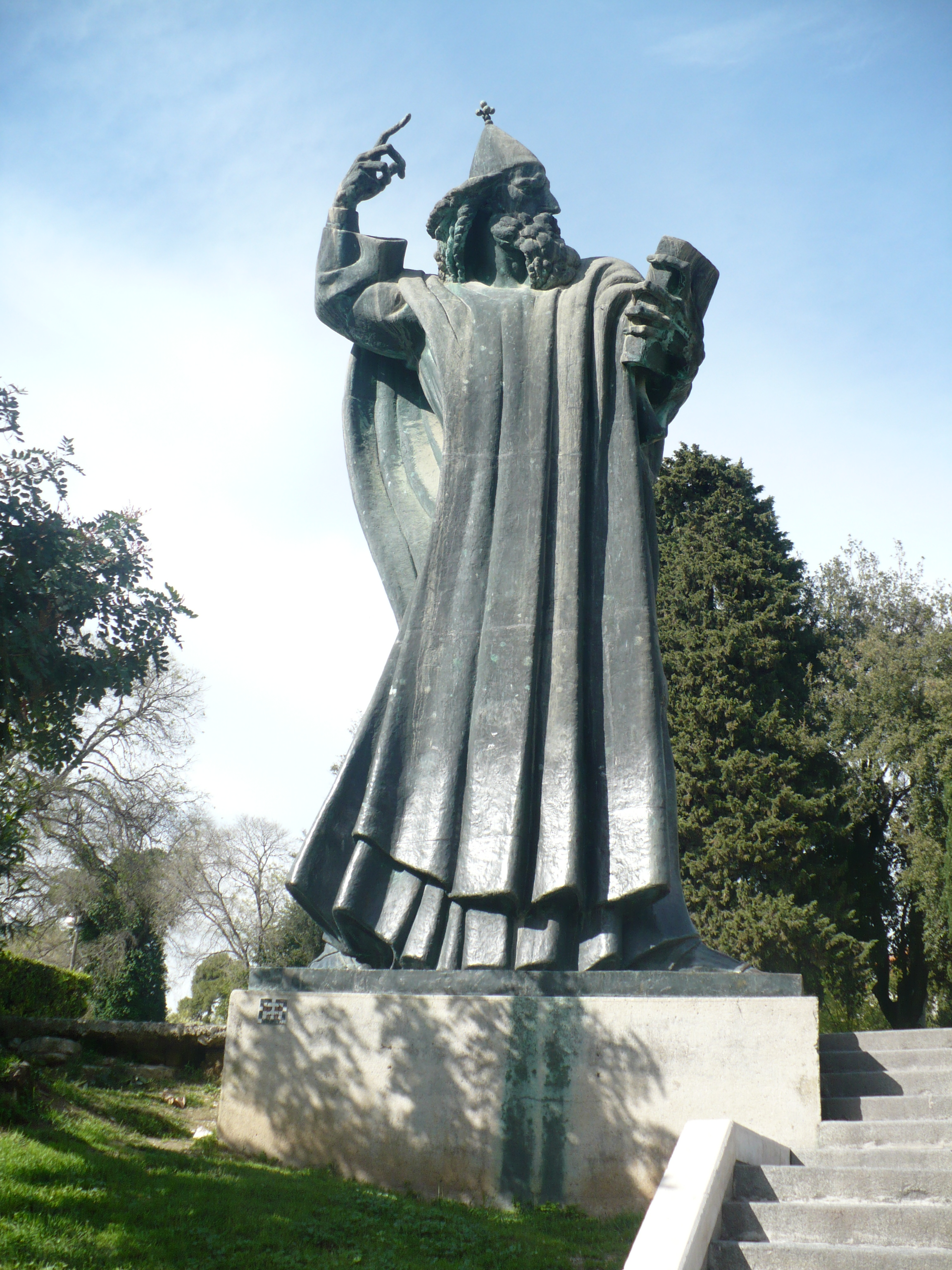 Split'ten görüntüler